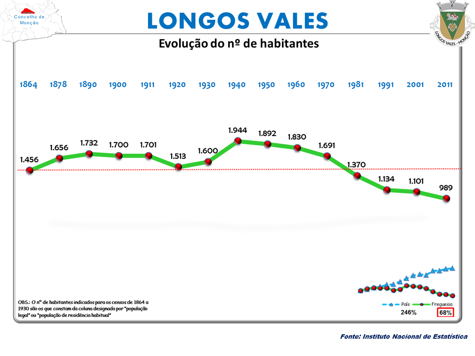 Censos 1864/2011